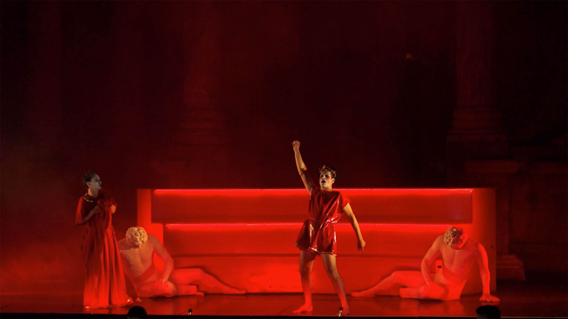 Escena de la ópera Calígula